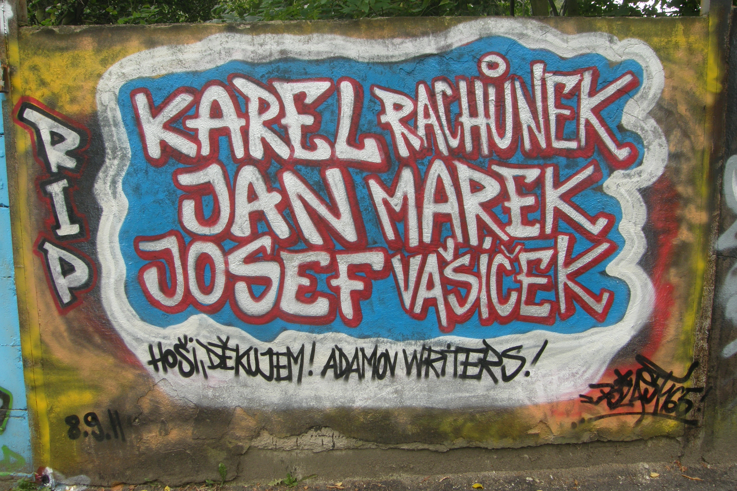 Graffiti v Adamově připomínající české oběti letecké havárie u Jaroslavli (7. září 2011)